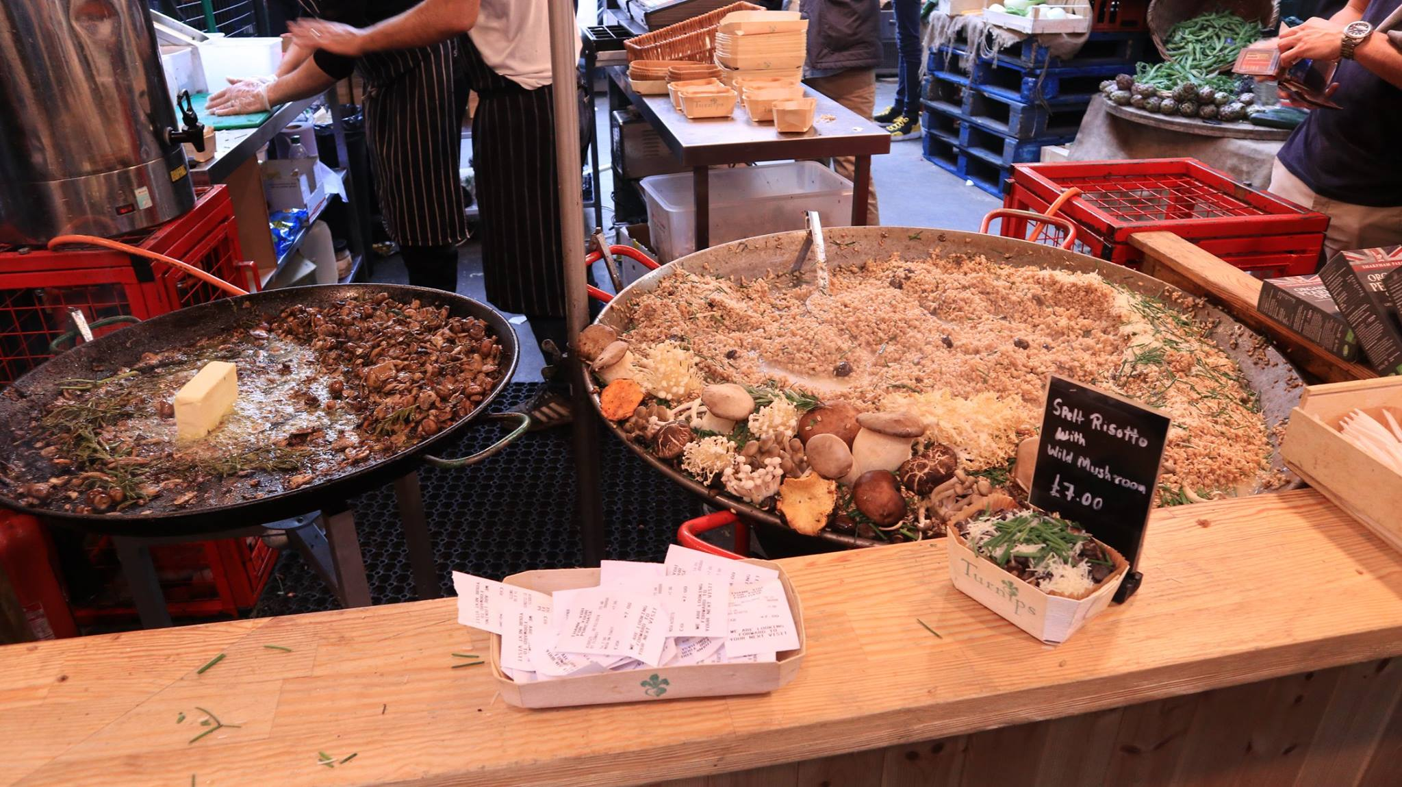 Na londýnských tržištích se ceny potravin pohybují stejně, jako v ostatních restauracích, navíc si k jídlu můžete vychutnat jedinečnou atmosféru